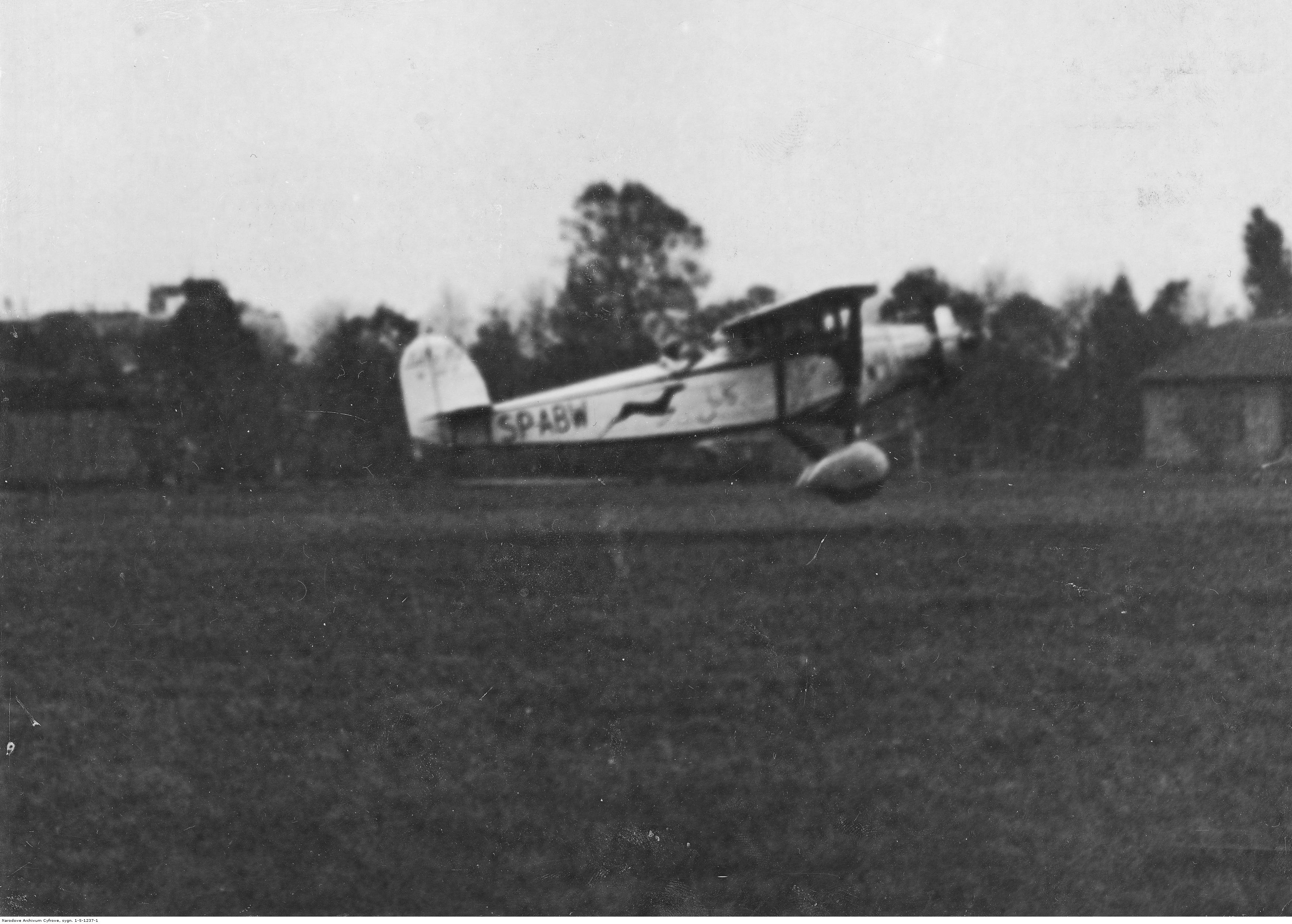 Samolot Lublin R-Xa SP-ABW kapitana Stanisława Karpińskiego i Wiktora Rogalskiego po rajdzie nad Azją Mniejszą ląduje na warszawskim lotnisku.